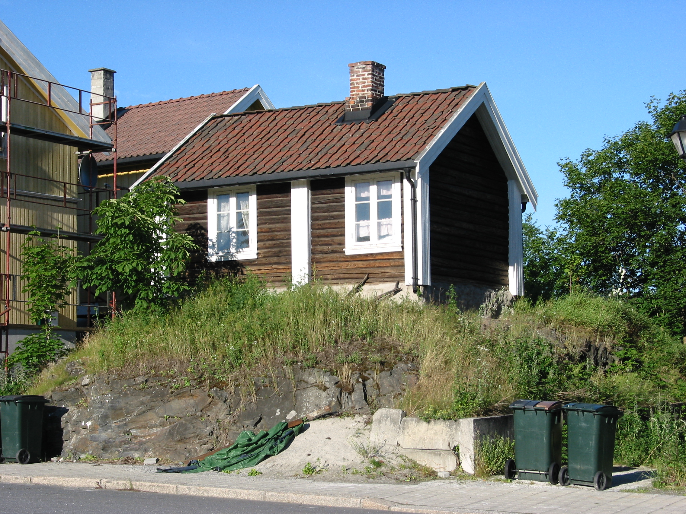 Madseberget in Vestfossen, Norway